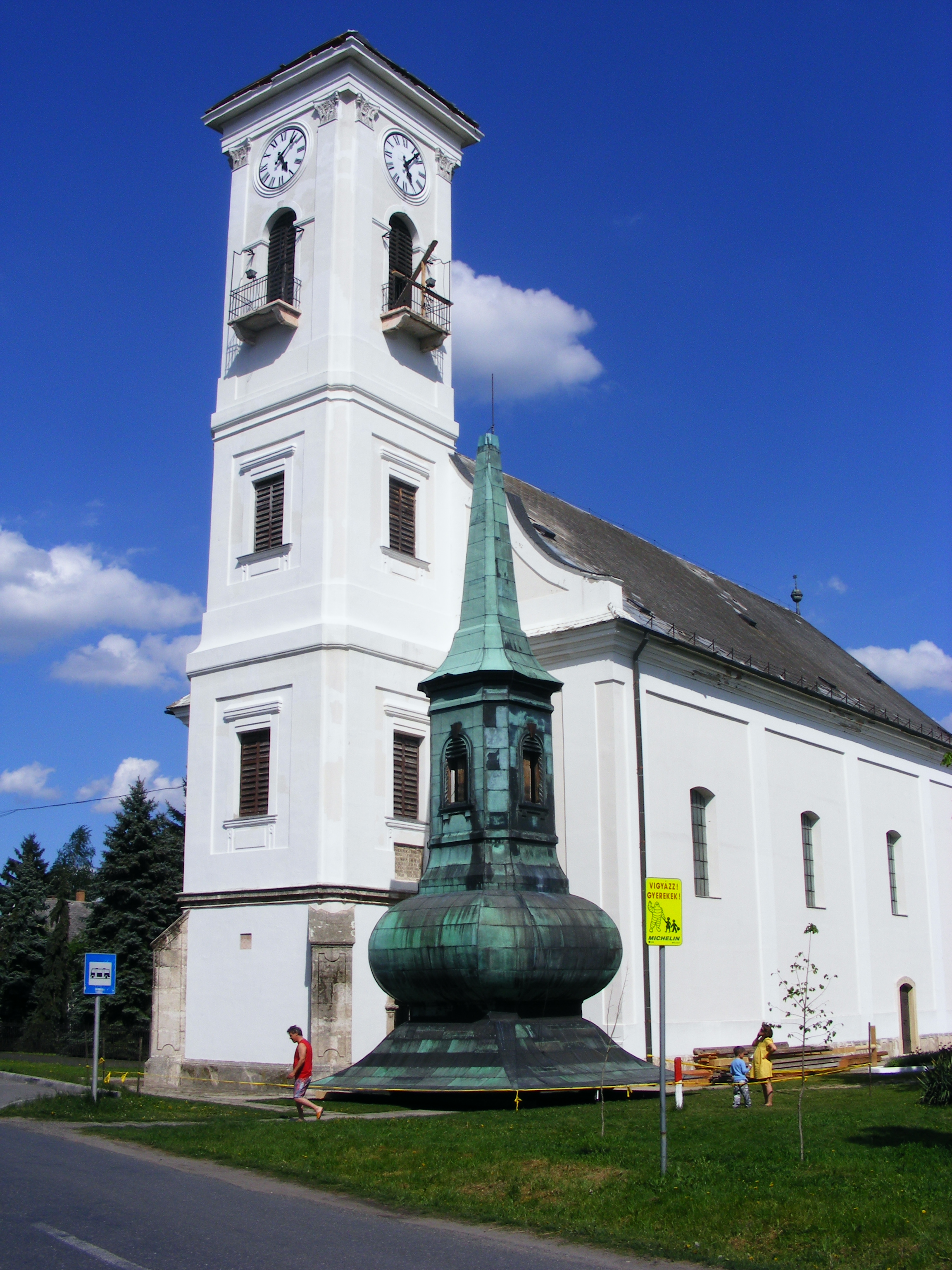 Fülöpszállás